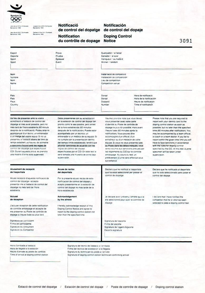 Formulari de notificació d'un control de dopatge dels JJOO de Barcelona 1992